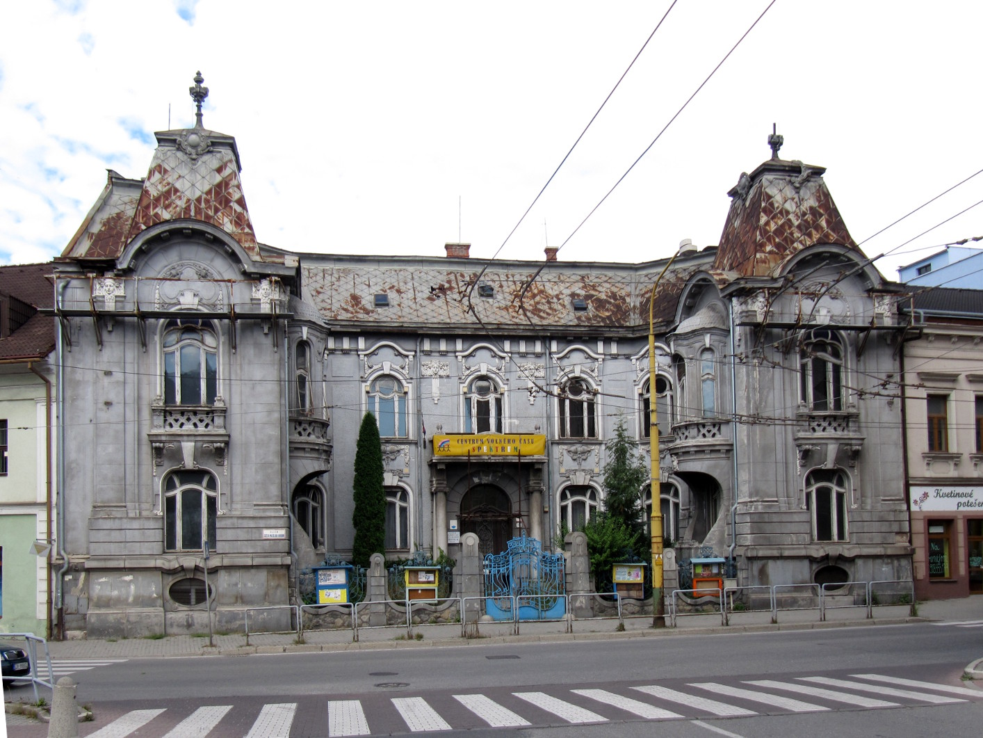 Žilina, Rosenfeldov palac, Hurbanova ul. 28